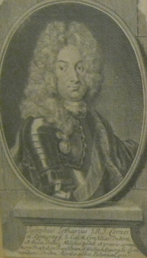 kopergarvure